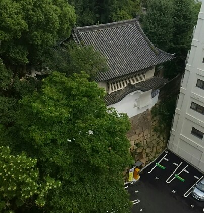 岡山城西ノ手櫓（重要文化財）